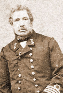 C.P. de Brauw